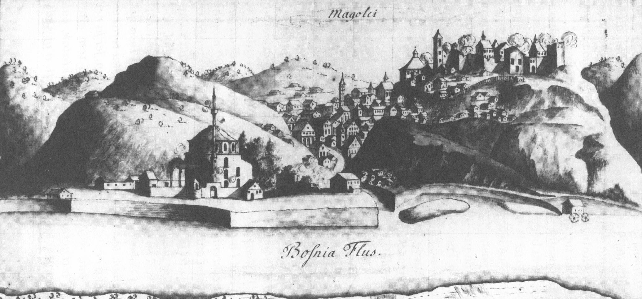 Гравюра города Маглай в Боснии и Герцеговине. Из книги Maglaj: na tragovima prošlosti. Adin Ljuca. 1999.